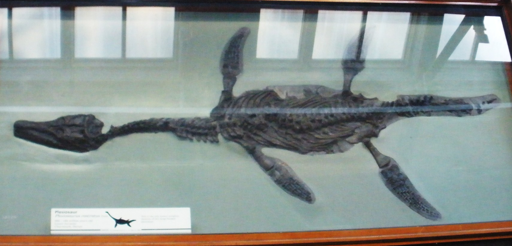 Fossil of Archaeonectrus, an extinct reptile-- Took the photo at Natural History Museum, London